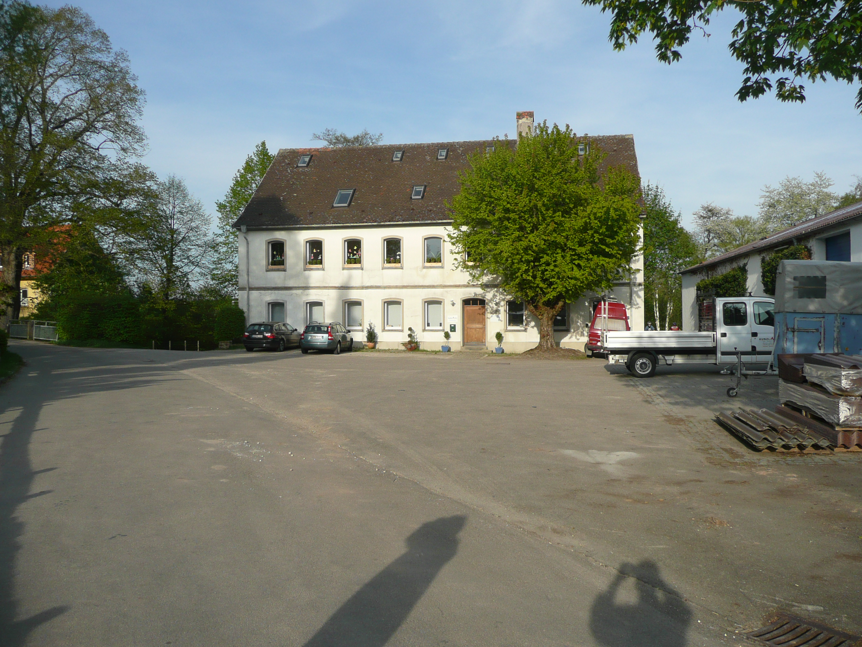 Walkmühle